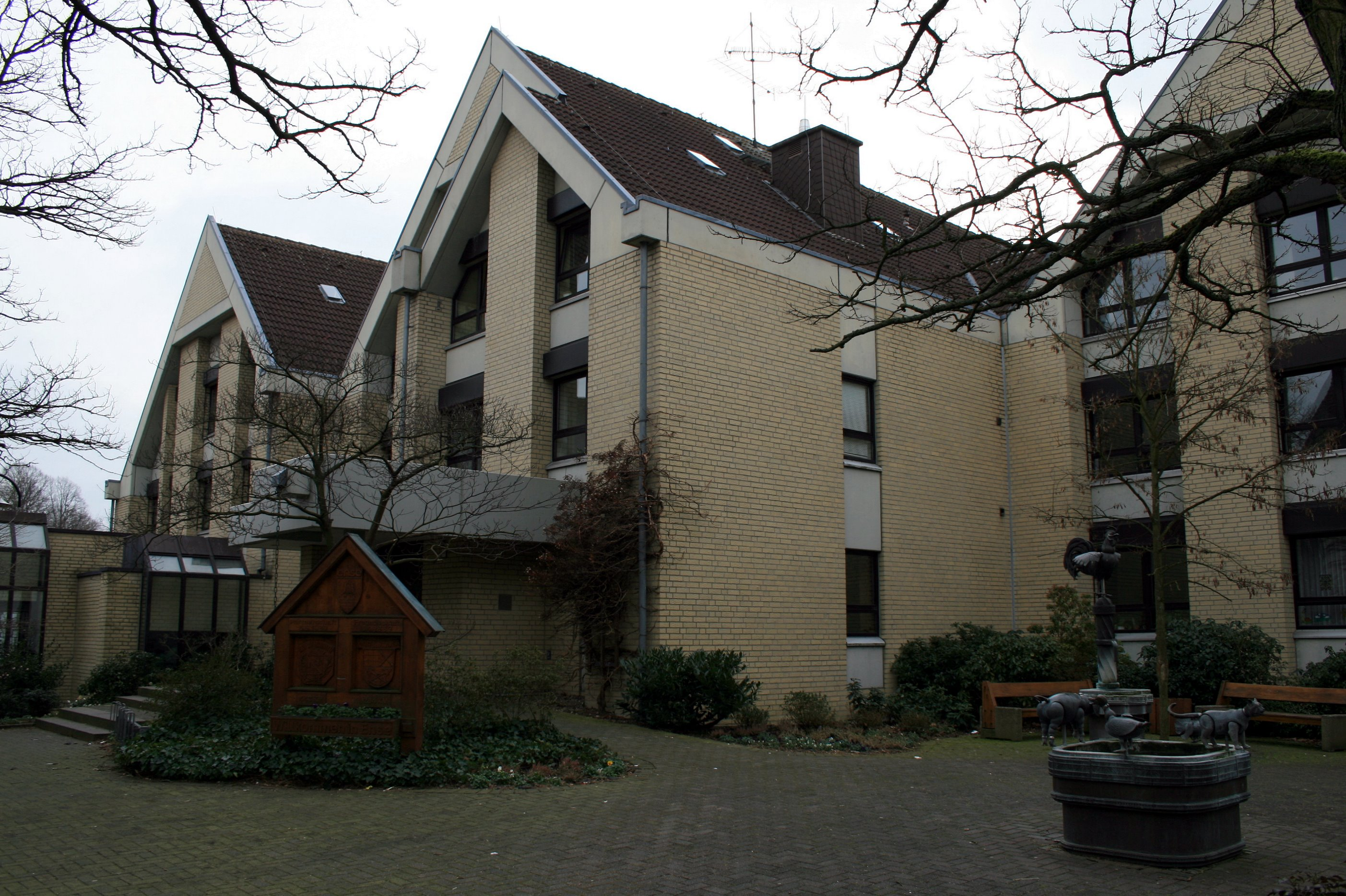 Rathaus von Ense im Ortsteil Bremen (Ense), Gemeinde Ense.